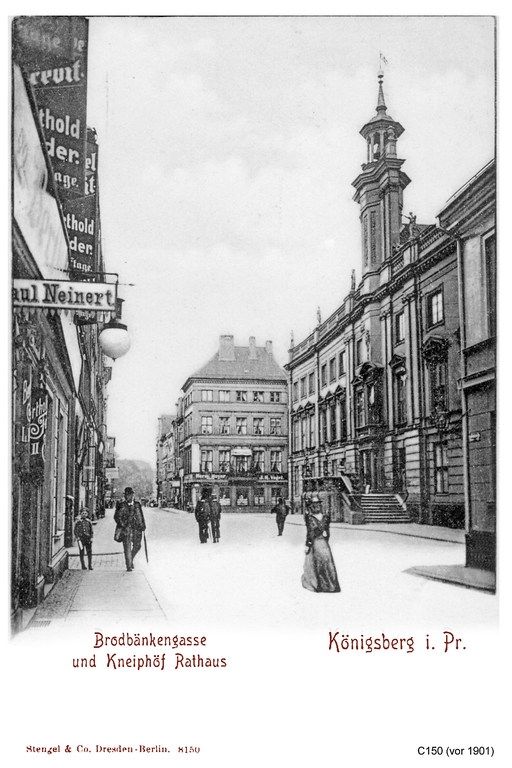 Kneibhöfisches Rathaus auf der Brodbaeckergasse in Königsberg